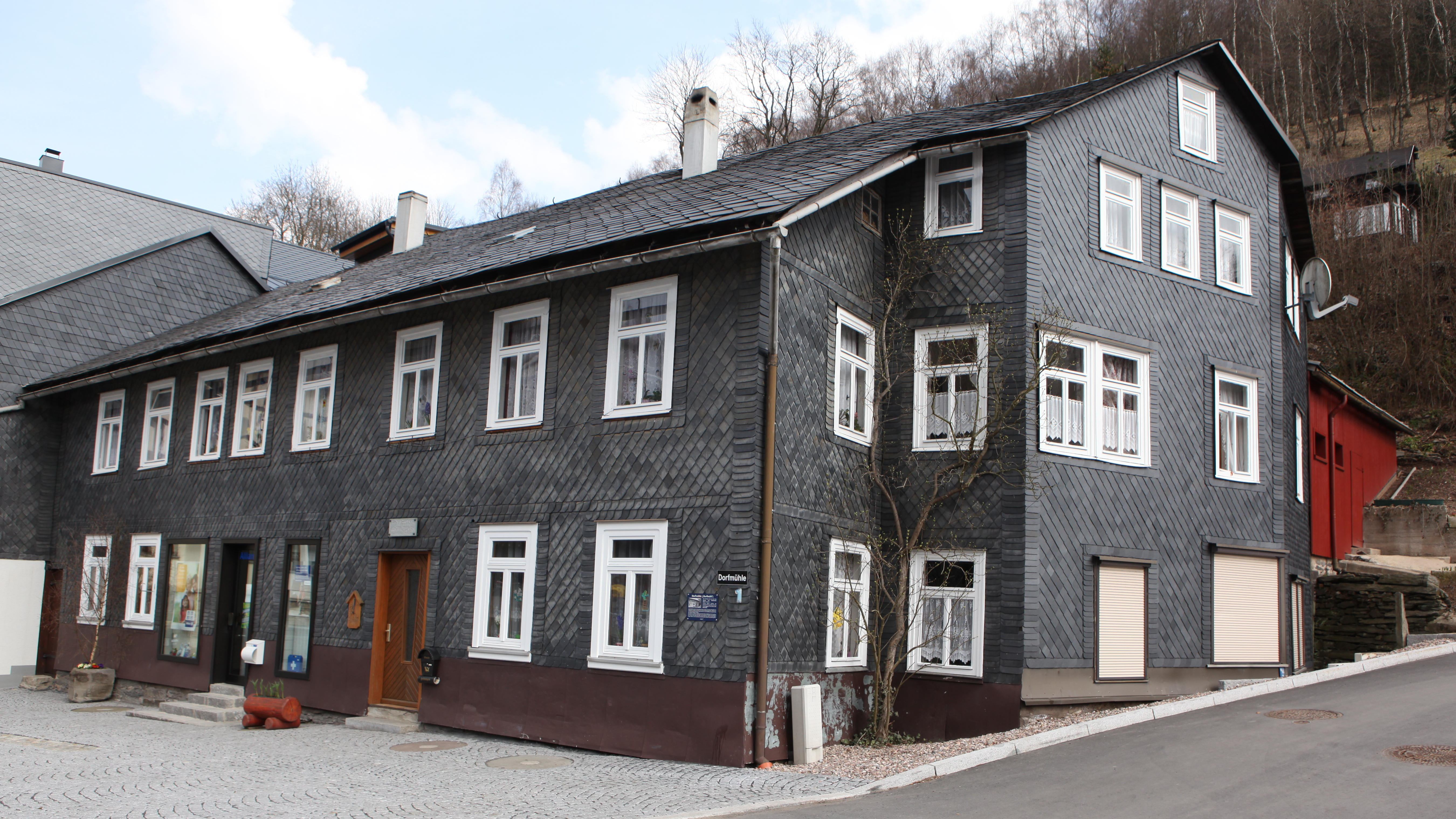 Ehemalige Dorfmühle in Lauscha in Thüringen